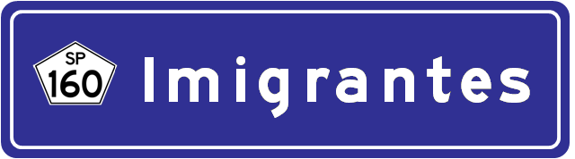 Placa da Rodovia dos Imigrantes, São Paulo, Brasil.